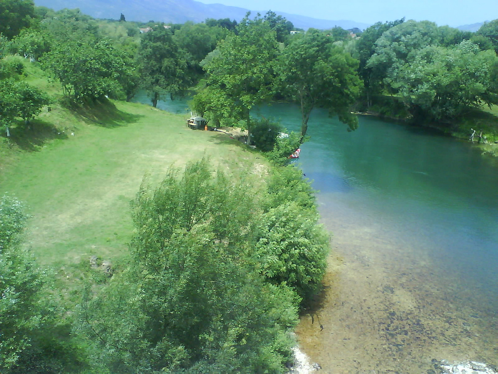 ...Zeta river...Montenegro